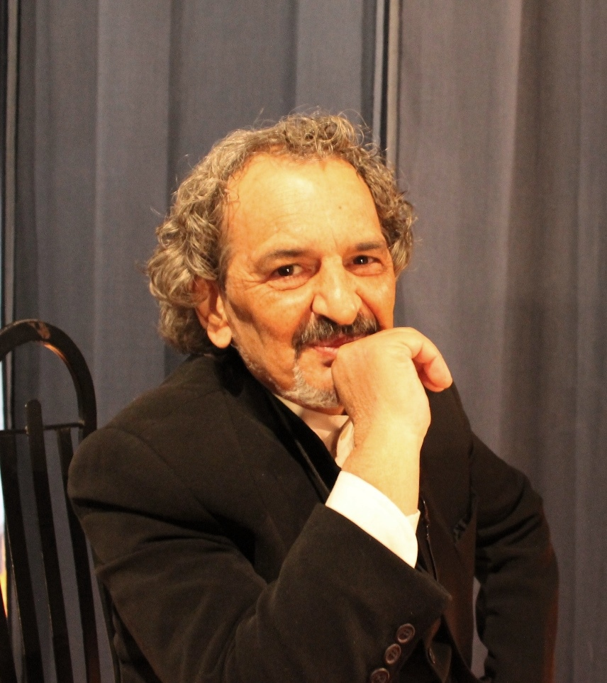 ابراهیم نظری